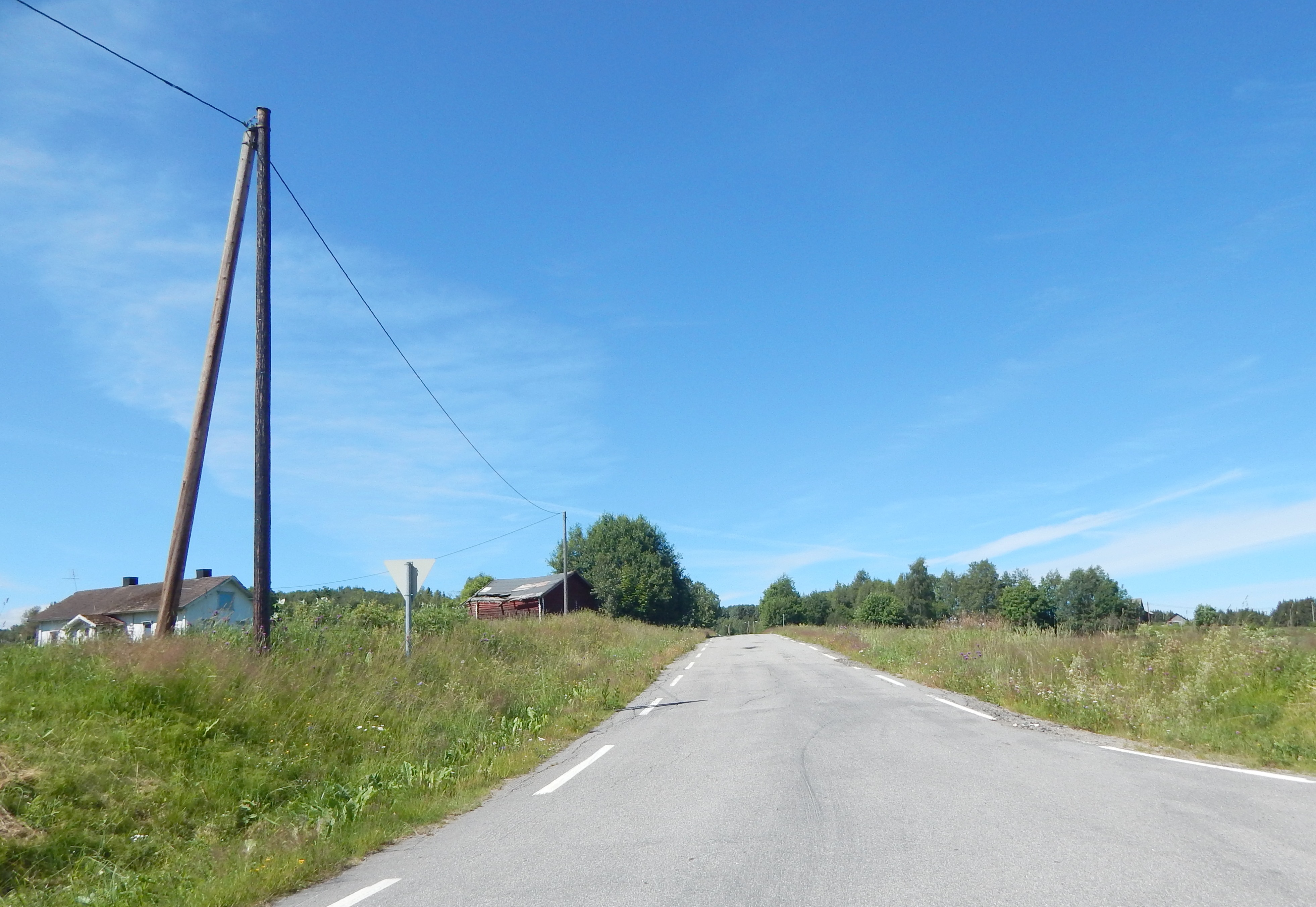 Enok Slettengs veg (FV544) sett fra Hernesvegen (FV545).